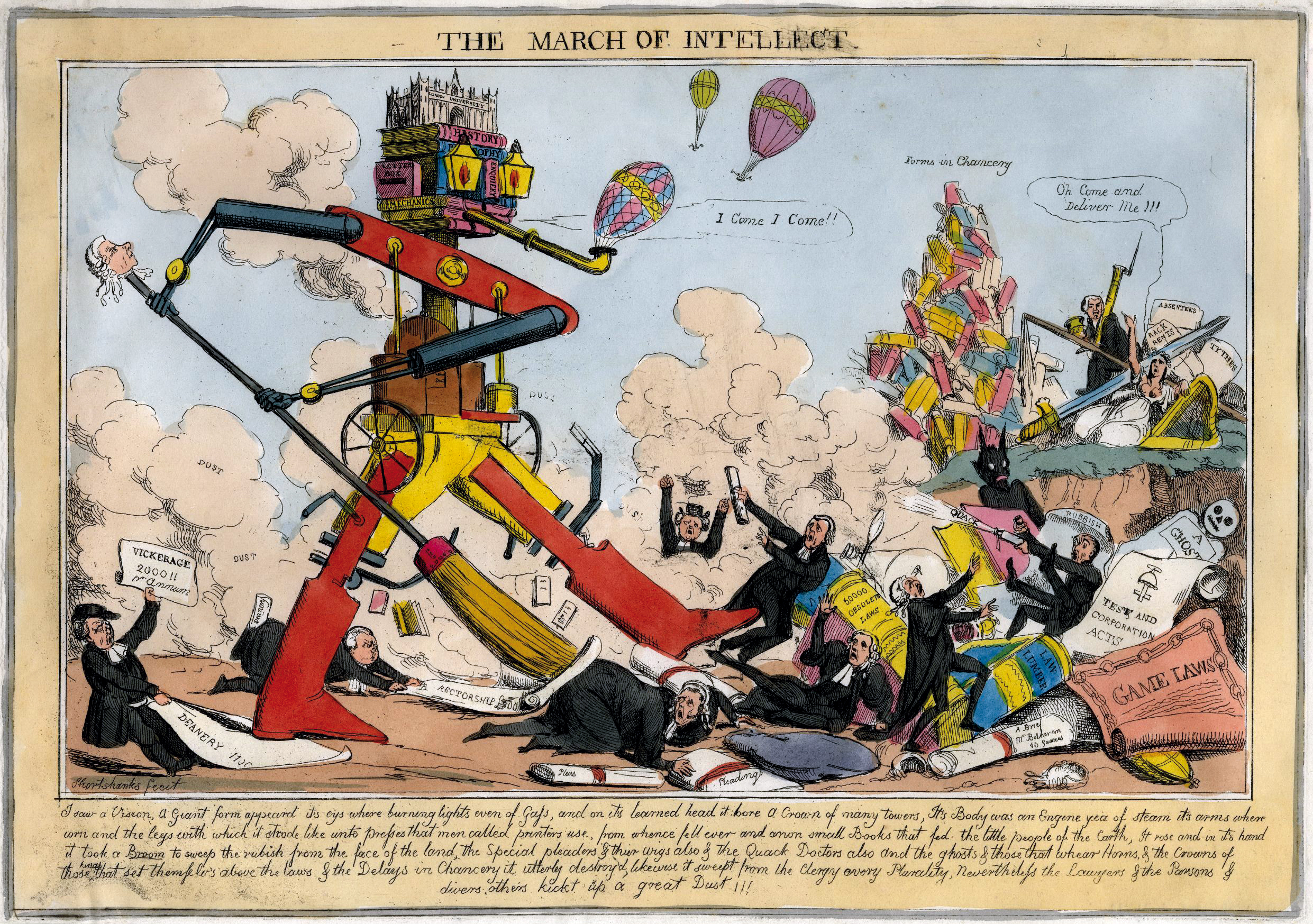 Caricature